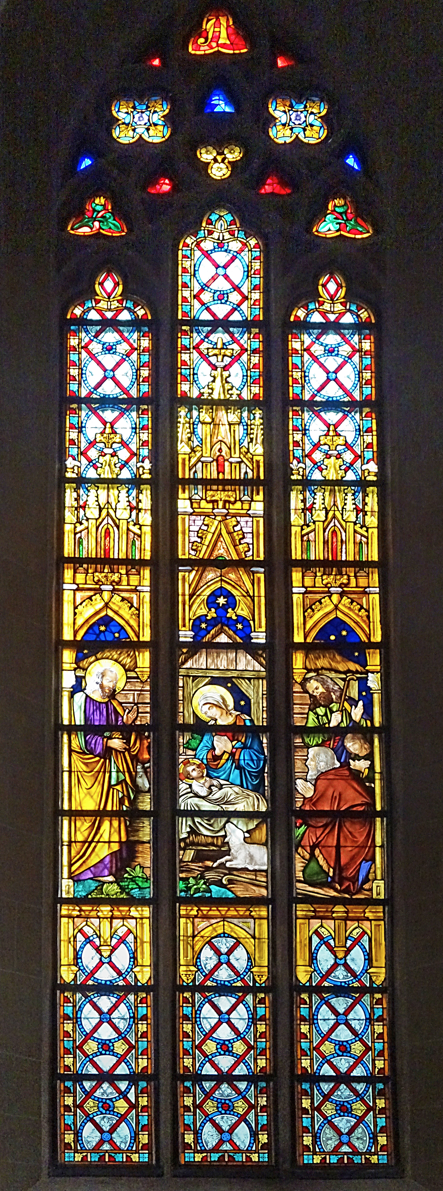 Buntglasfenster in der Pfarrkirche St. Nikolai (Quedlinburg)